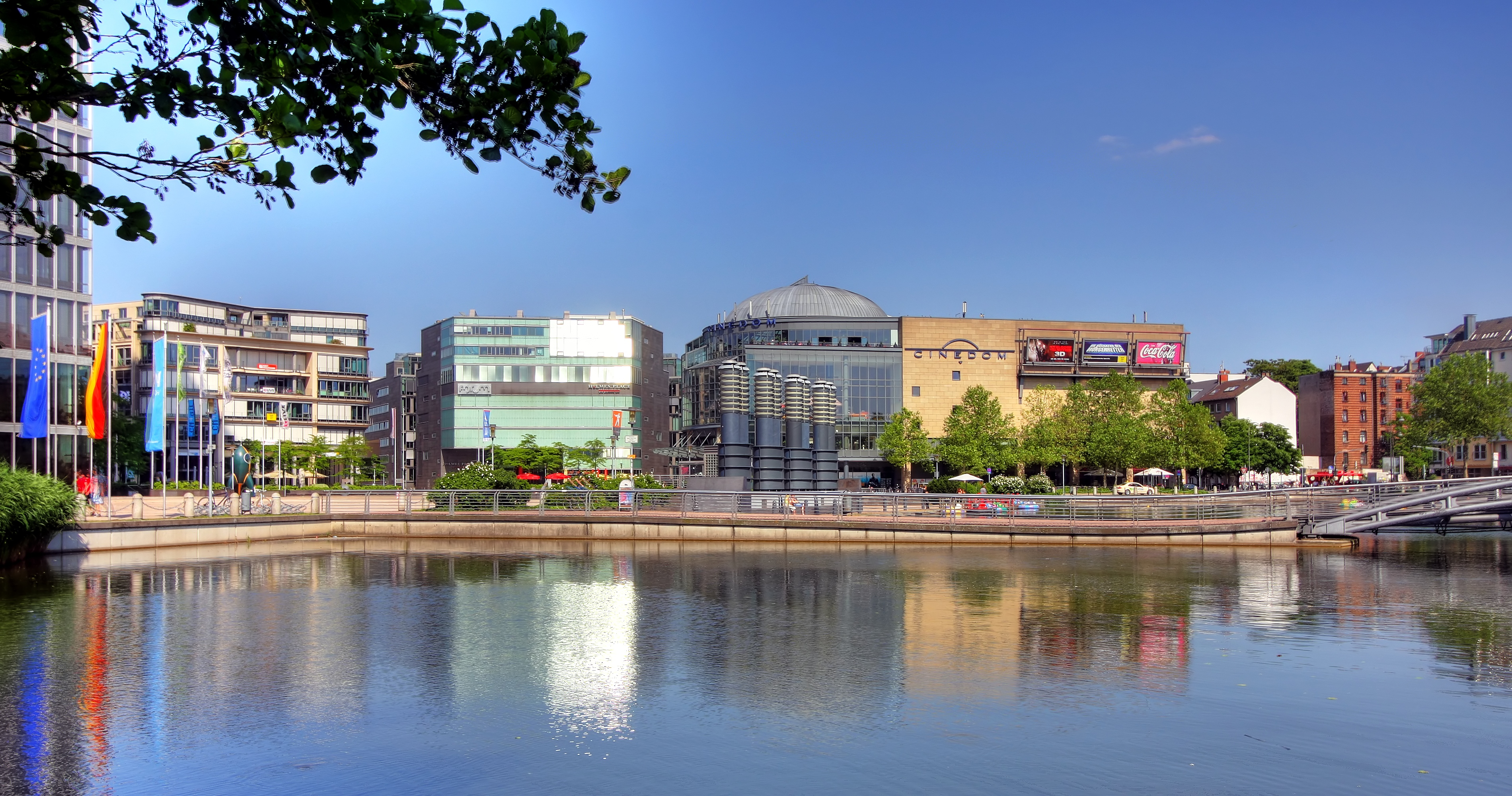 Mediapark Köln, Häuser 5, 4 und 1 (Cinedom). Im Vordergrund der Mediapark-See